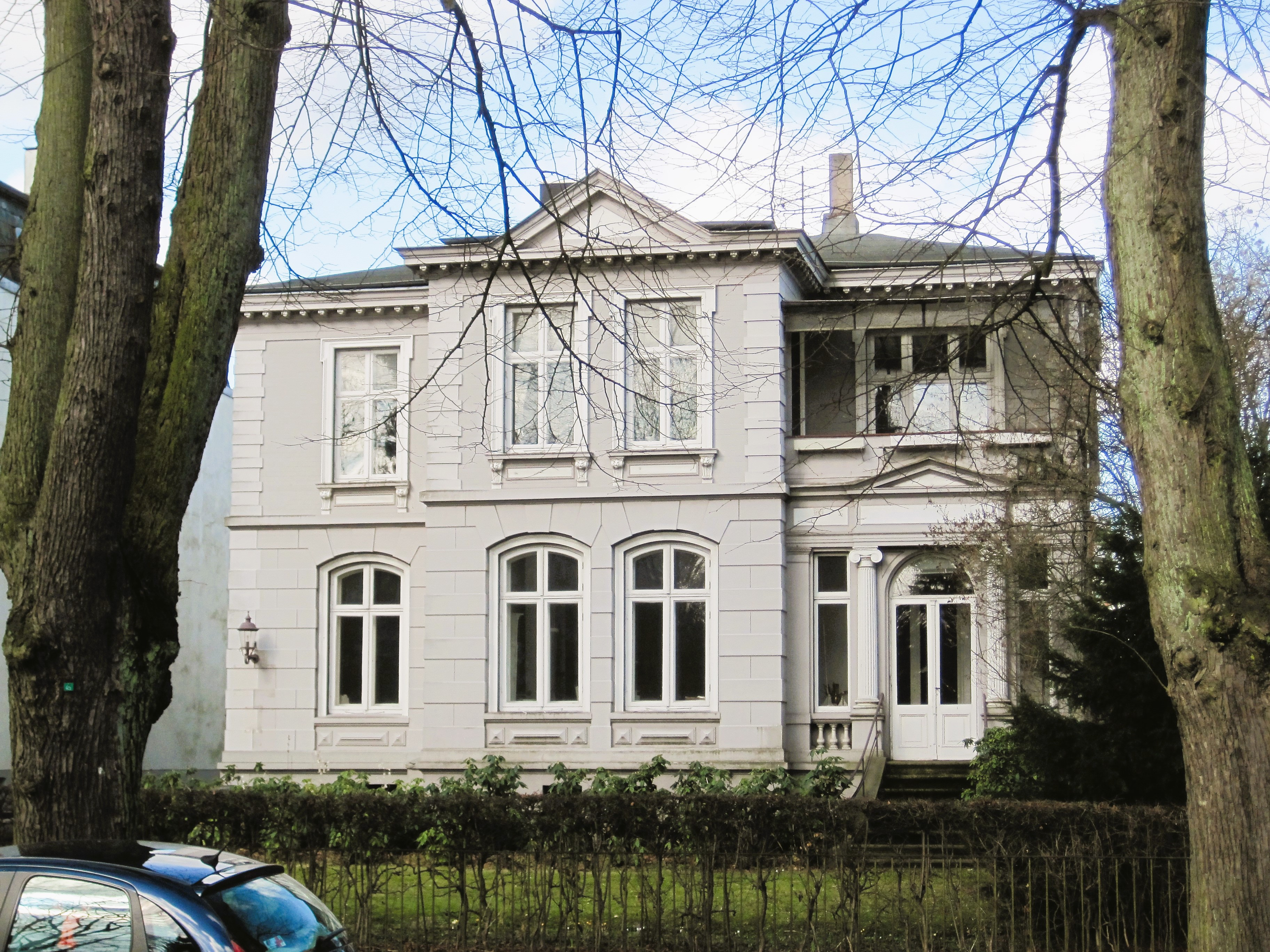 Gartenhaus in der Roeckstraße der Lübecker Vorstadt St. Gertrud. Hier wohnte Julia da Silva-Bruhns, die Mutter von Thomas und Heinrich Mann nach dem Tode ihres Mannes Senator Mann.